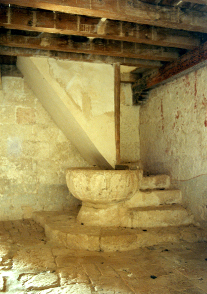 Pila de la ermita de Reveche (Burgos, España)